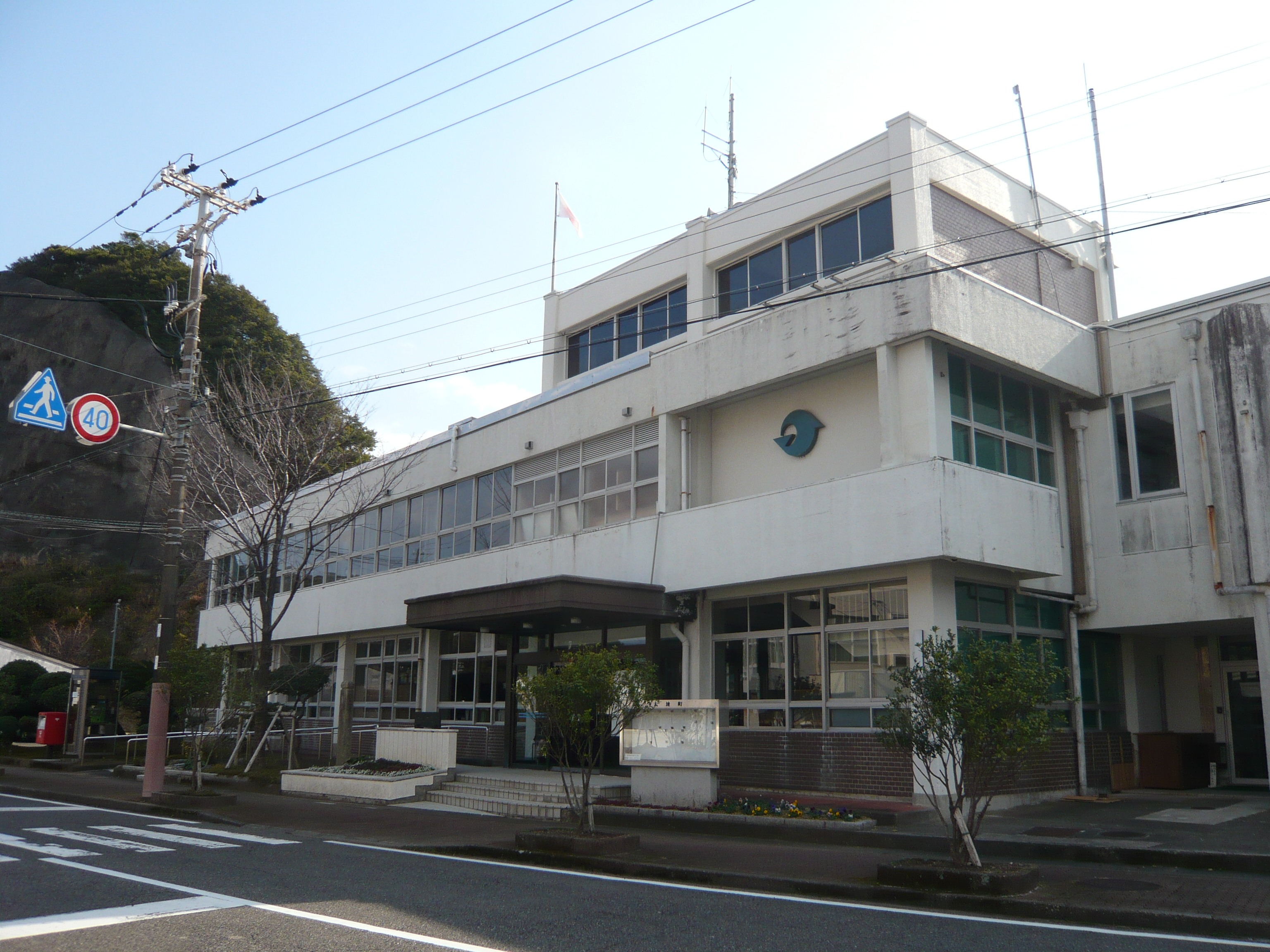 太地町役場正面